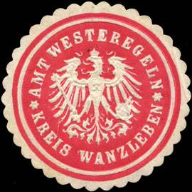 Sealing stamp Title: Amt Westeregeln Kreis Wanzleben Description: geprägt, rot, weiß Place: Westeregeln size: 3 cm